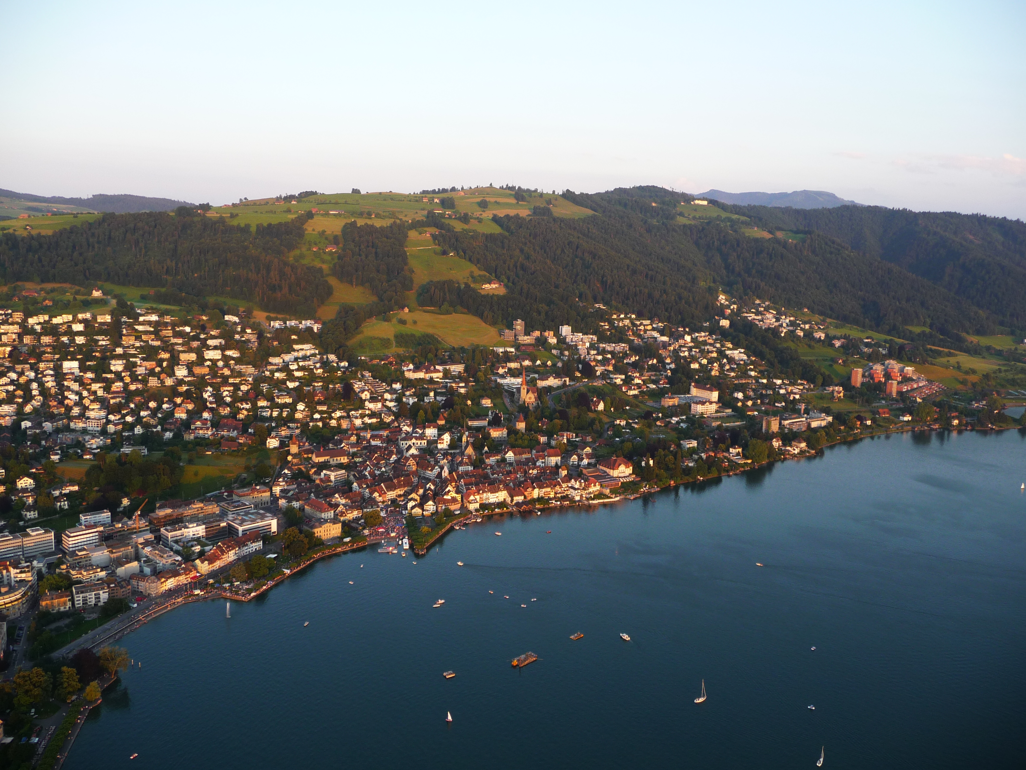 Zug aus der Luft